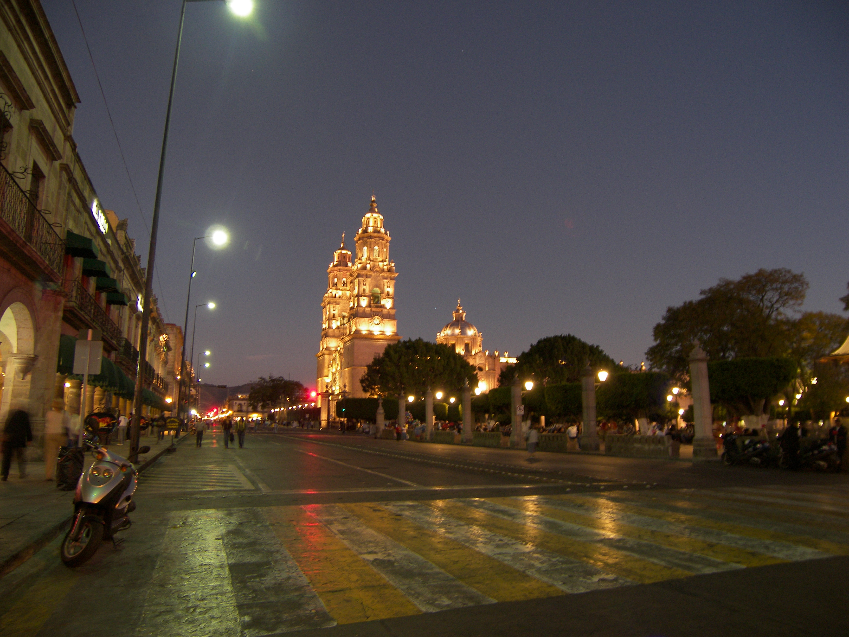 Morelia ,Michoacán , México. trabajo propio Morelia ,Michoacán, México. own work marzo 2007